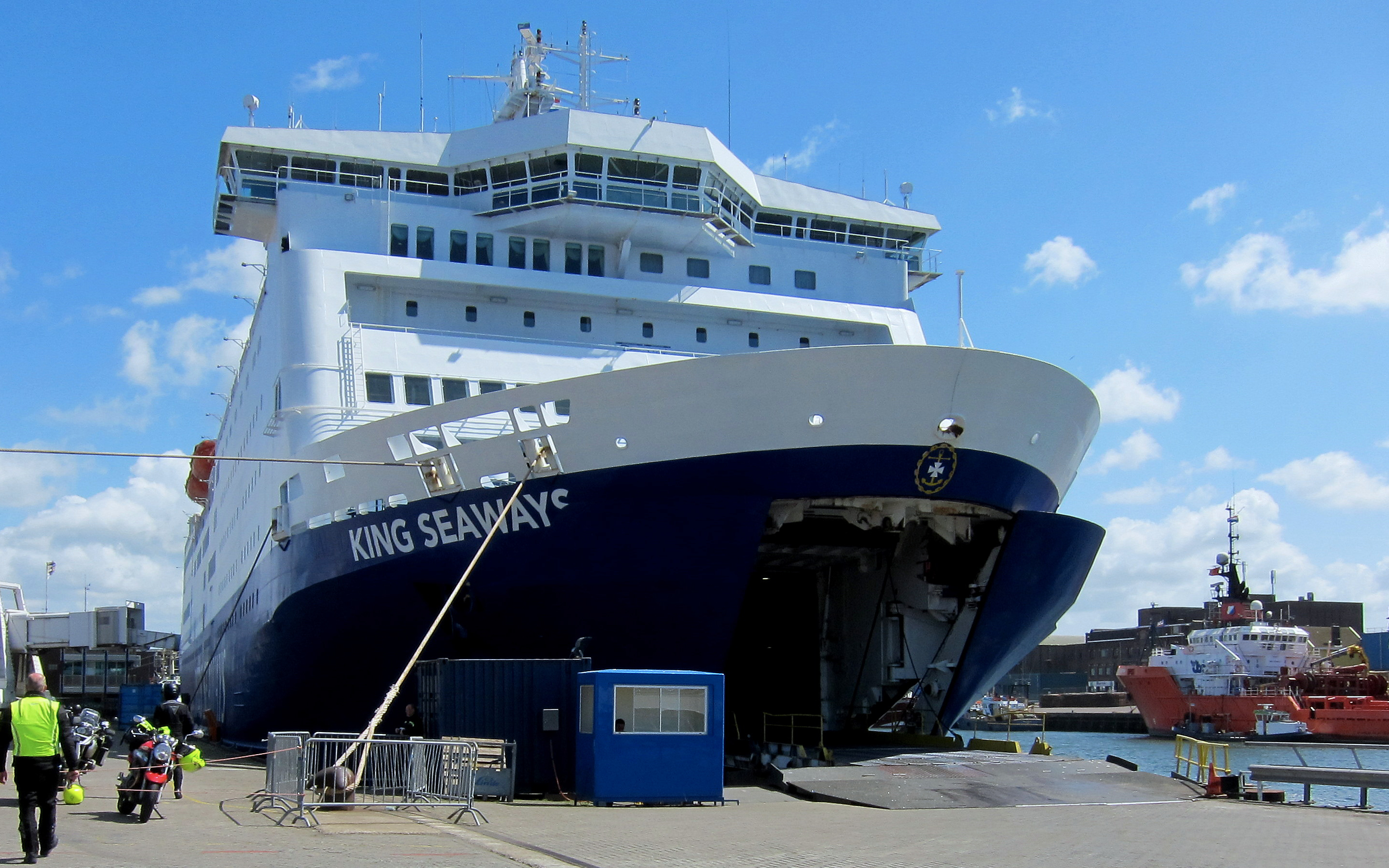 King Seaways in IJmuiden, vroeger King of Scandinavia genoemd